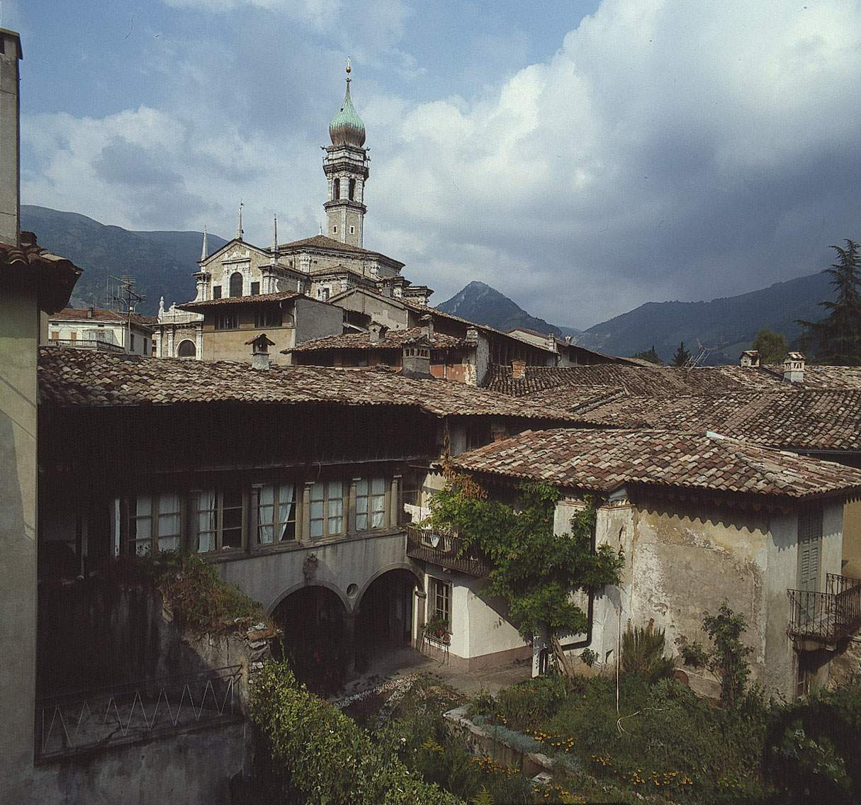 Gandino, palazzo Ioverini.